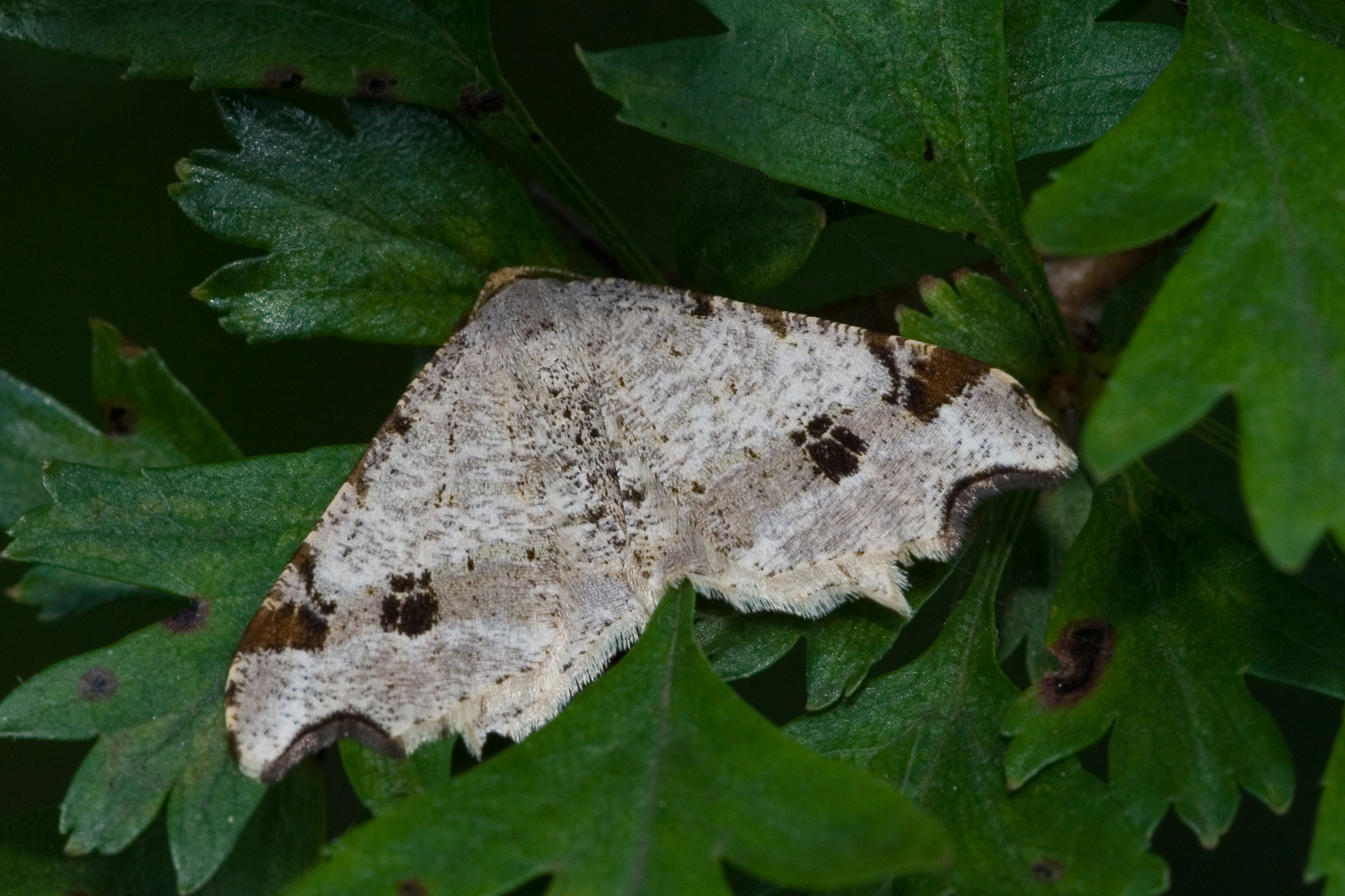 Macaria alternata